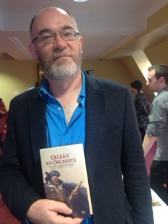 Darach Ó Scolaí ag 'Oireachtas na Gaeilge 2015', agus 'Oileán an Órchiste' ina lámh aige, aistriúchan agus oiriúnú a rinne sé ar 'Treasure Island' le Robert Louis Stevenson